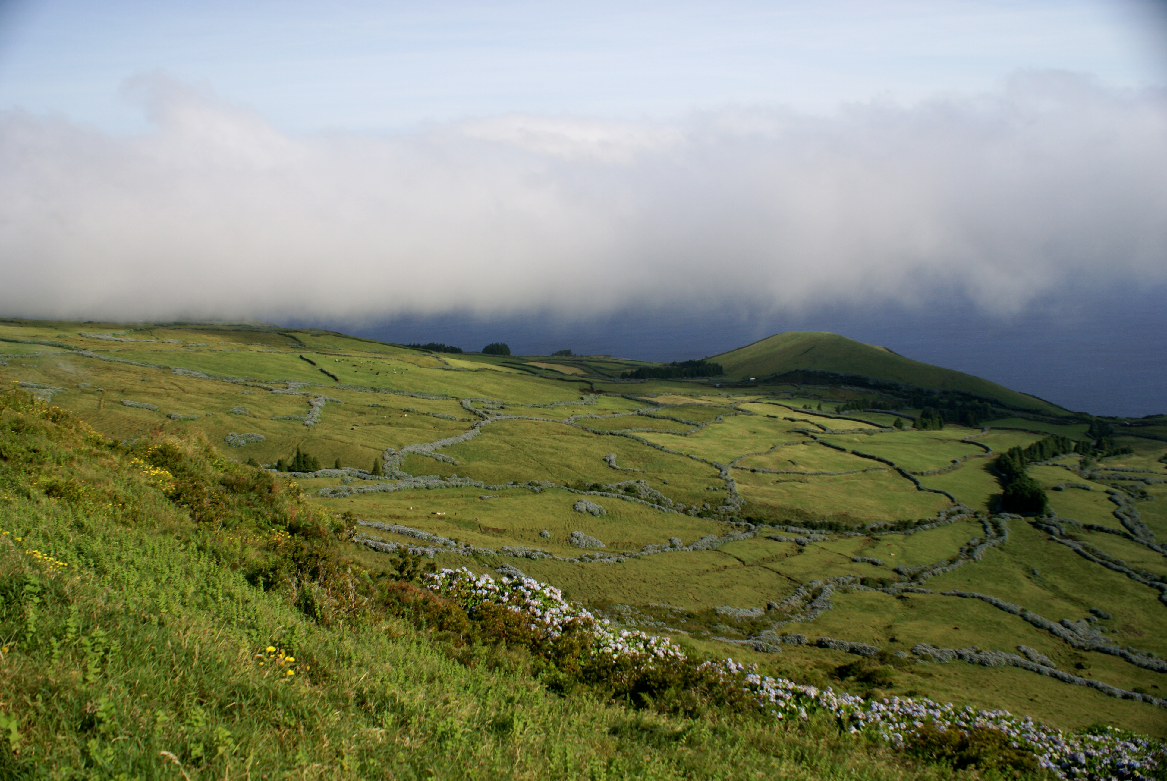 Pastagens ao Norte do Toledo, Velas, São Jorge, Açores